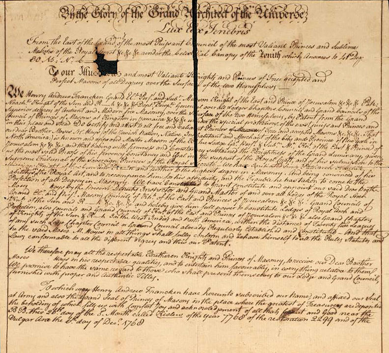 En 1771, Henry Andrew Francken rédige un manuscrit contenant les rituels du 15e au 25e degré du Rite écossais ancien et accepté. Il rédige au moins deux autres manuscrits, le premier en 1783 et le second vers 1786, qui contiennent tous les degrés du 4e au 25e.